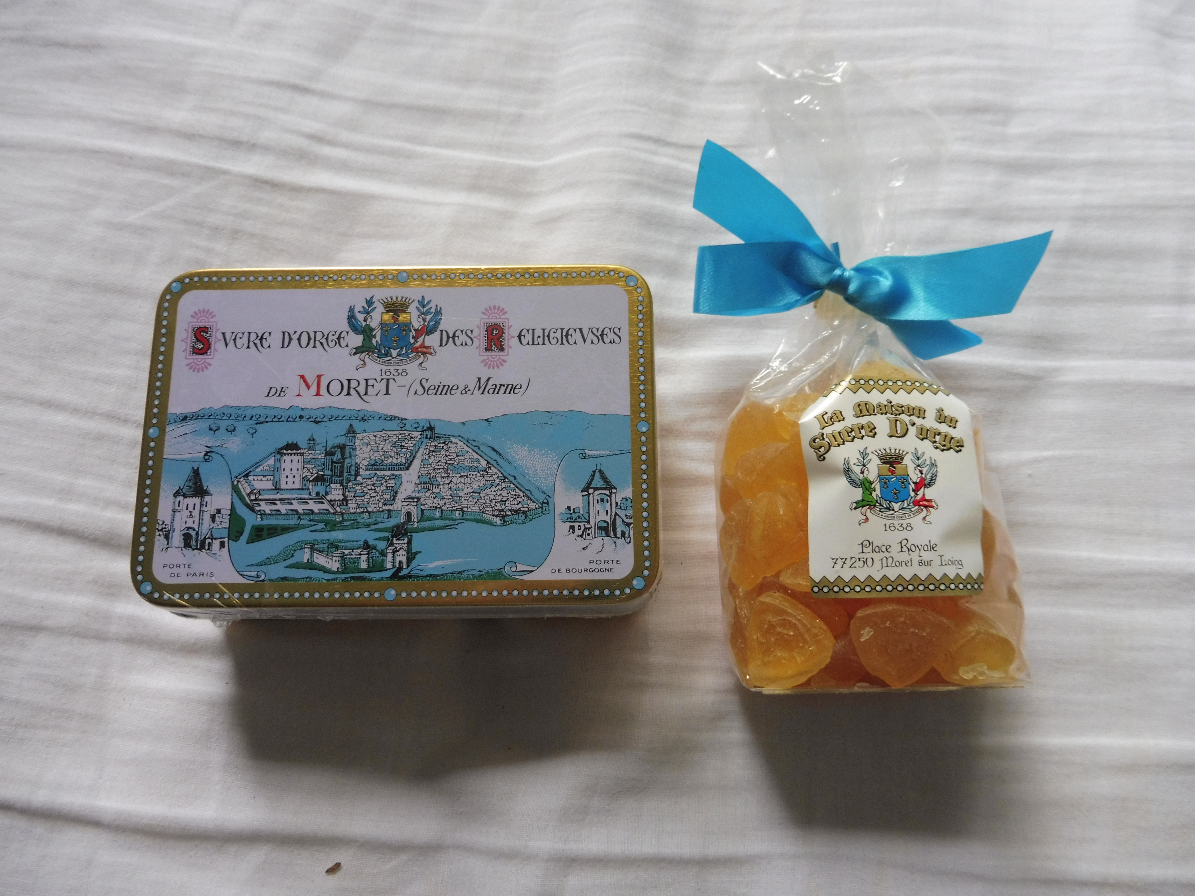 Boite et sachet de berlingots de sucre d'orge des religieuses de Moret, achetés à la Maison du sucre d'orge de Moret-sur-Loing.